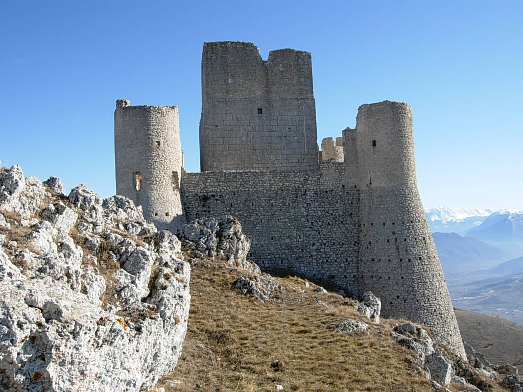 Veduta di Rocca Calascio (AQ) Foto personale concessa in PD